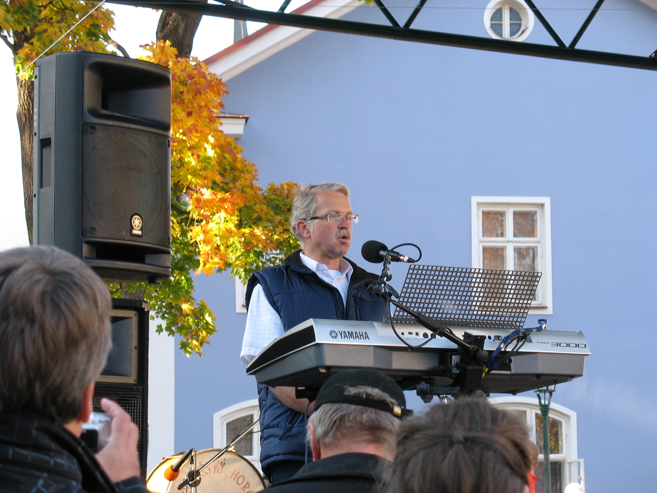 Petr Rudolf Manoušek ve Vrchlabí.Parčik na náměstí T.G.Masaryka. Městská knihovna Vrchlabí.Ulice Krkonošská 630. Vrchlabí. Královéhradecký kraj. Czech Republic.